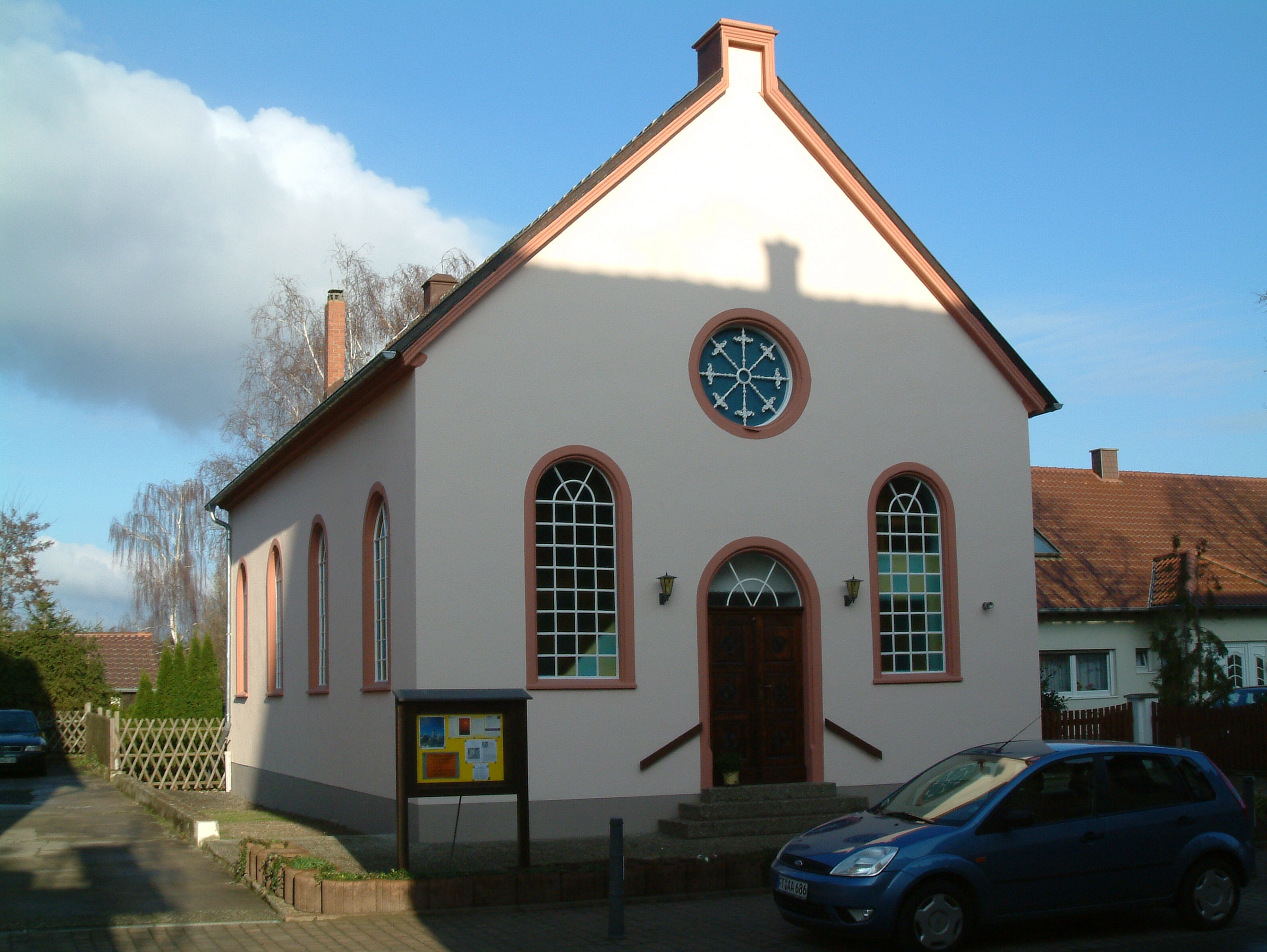 Mennonitenkirche zu Obersülzen, selbst fotografiert am 2006-12-18 und freigegeben durch Benutzer:Mundartpoet